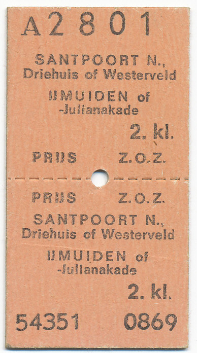 Kartonnen treinkaartje van Station Santpoort Noord, Driehuis of Westerveld naar IJmuiden of IJmuiden-Julianakade A 2801.